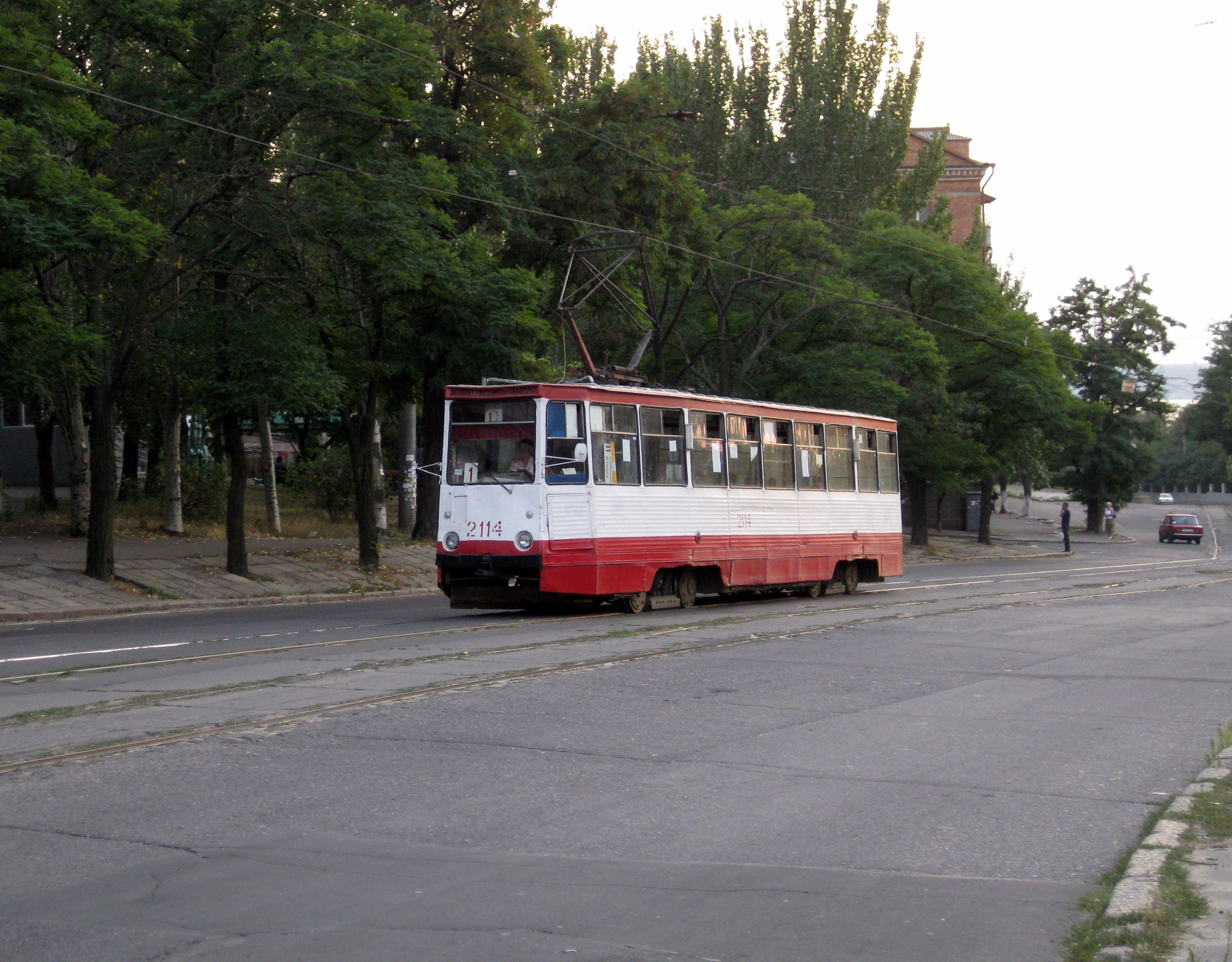 Трамвай 71-605, № 008985 в Николаеве